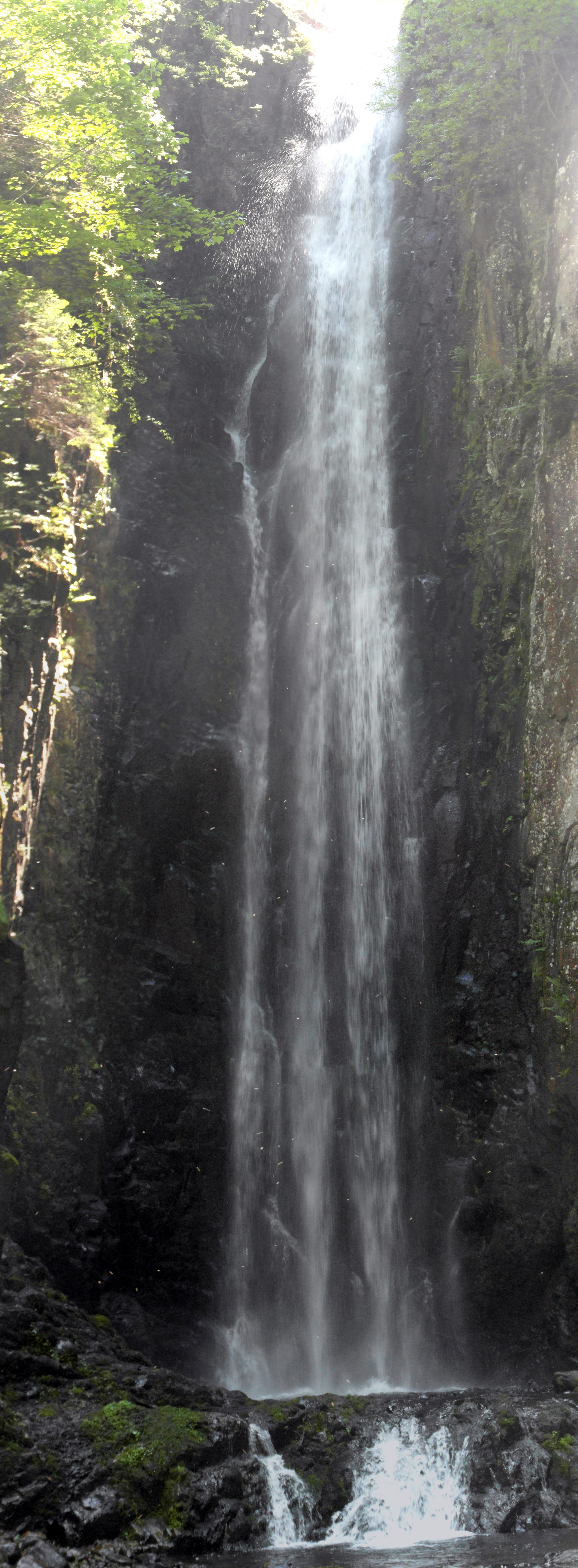 Cascata del lupo